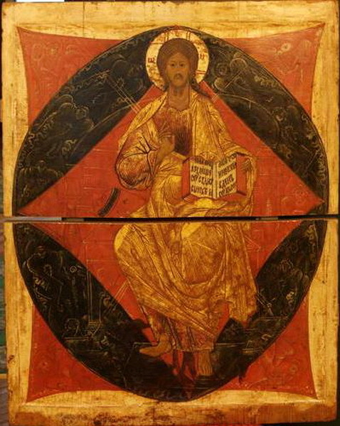 На иконе «Спас в силах» Иисус Христос (Спаситель) изображен восседающим на престоле в окружении небесных сил – ангелов.